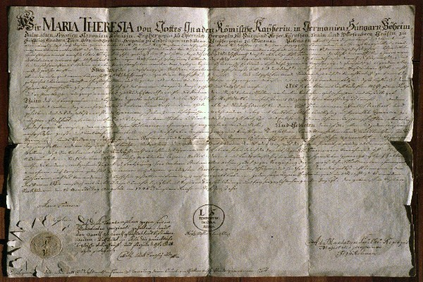 Ustanovna listina Gimnazije Novo mesto, ki jo je leta 1746 izdala cesarica Marija Tereza.